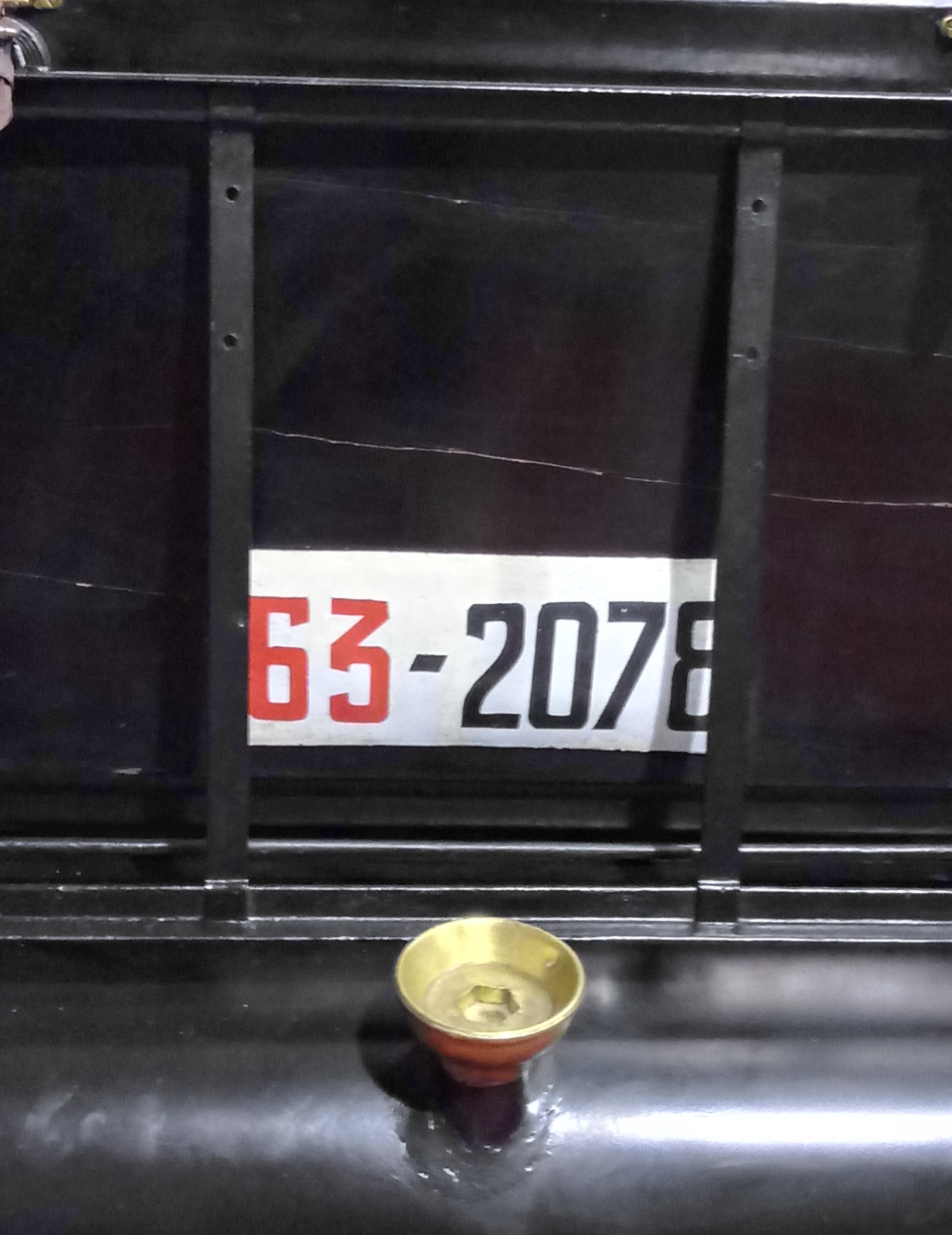 La foto rappresenta la targa posteriore, con numero 63 identificativo della provincia di Torino, di una Fiat 18/24 HP del 1908, esposta dal 25 al 27 ottobre 2019 in un padiglione della fiera di Padova dedicata alle auto d'epoca